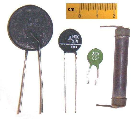 Versch. Heißleiter zur Einschaltstrombegrenzung, rechts URDOX-Widerstand andere Versionen